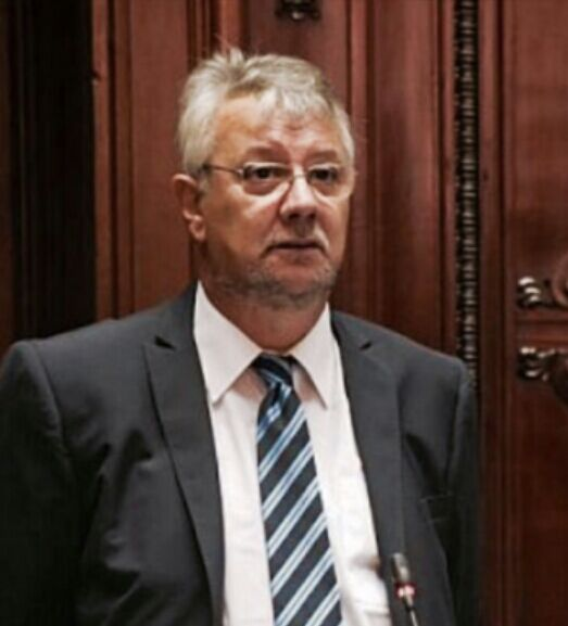 En el Senado